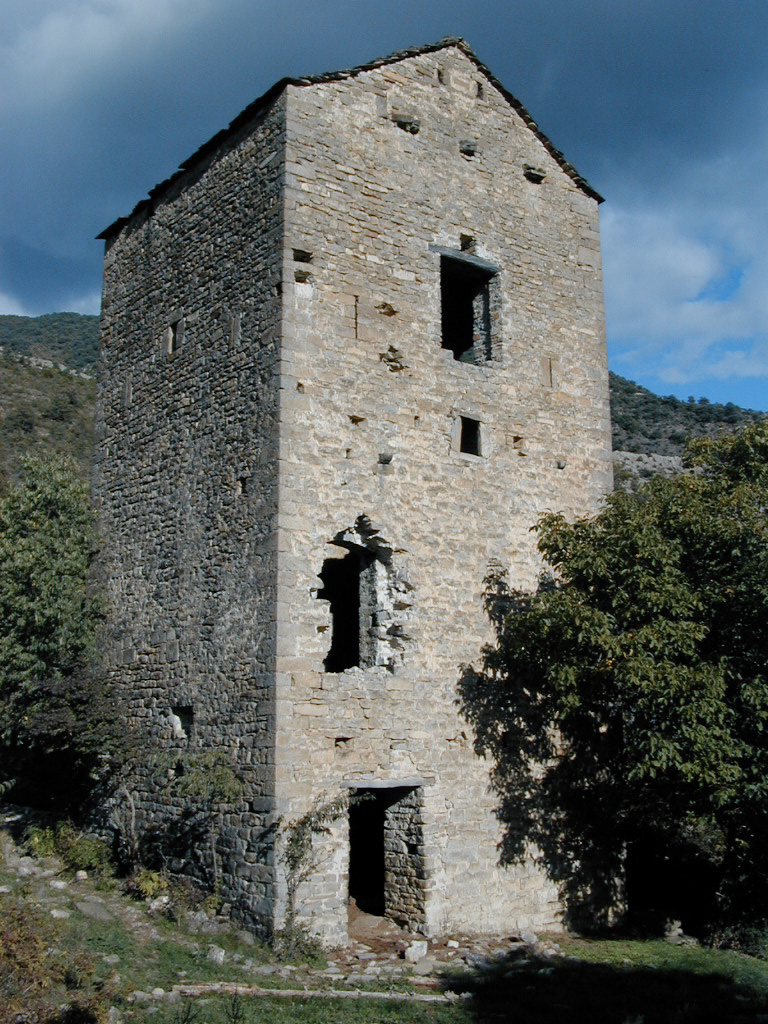 Torre en la Velilla